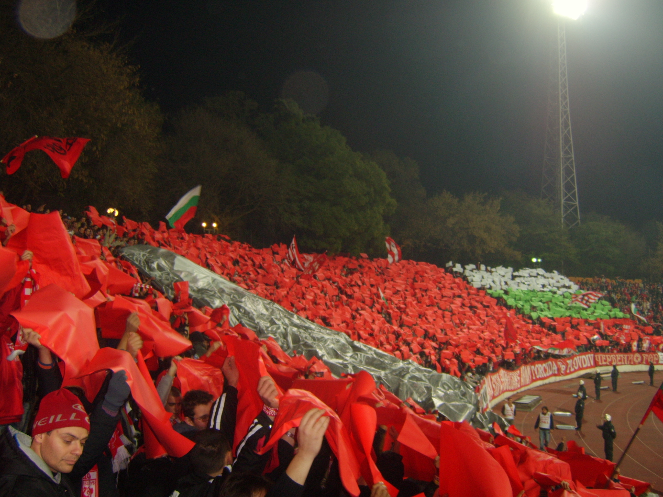 ст. Българска Армия преди мача с Хамбургер от група "А" на турнира за купата на УЕФА, сезон 2005/06.